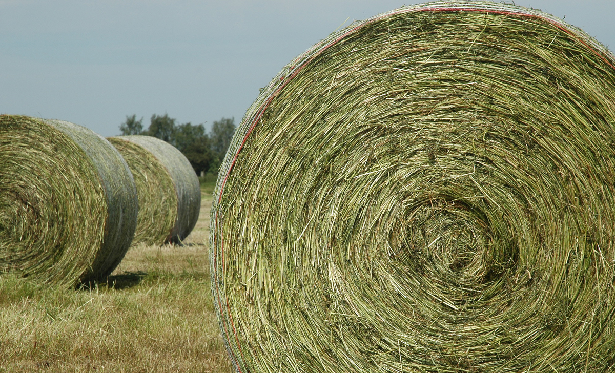 Heurundballen – „Heu in einer neuen Form - vom Ballenpresser hergestellt“